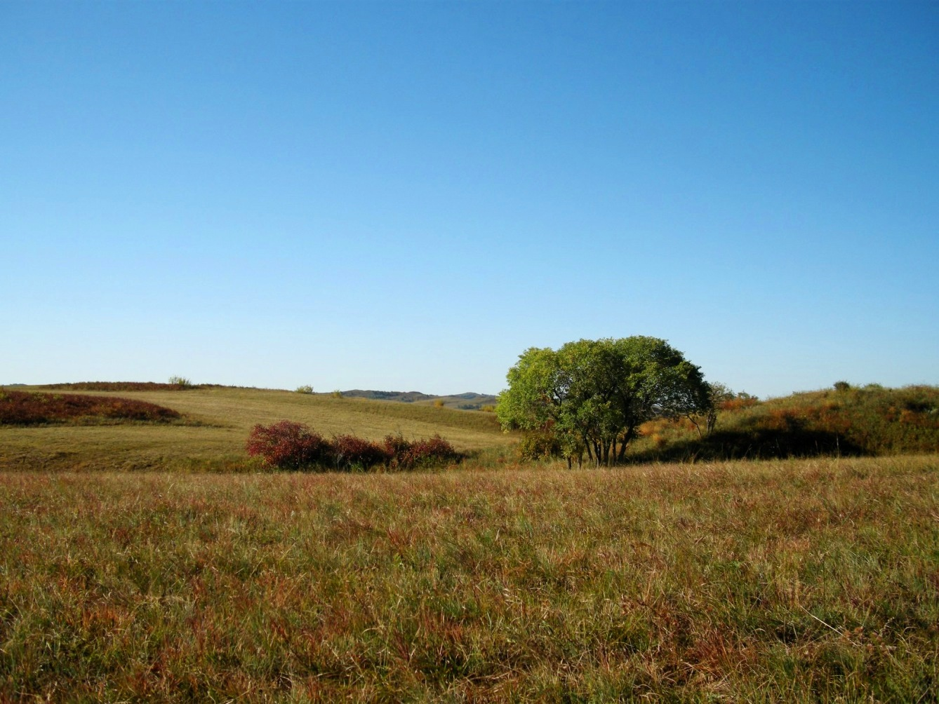 内蒙古赤峰市乌兰布统坝上草原